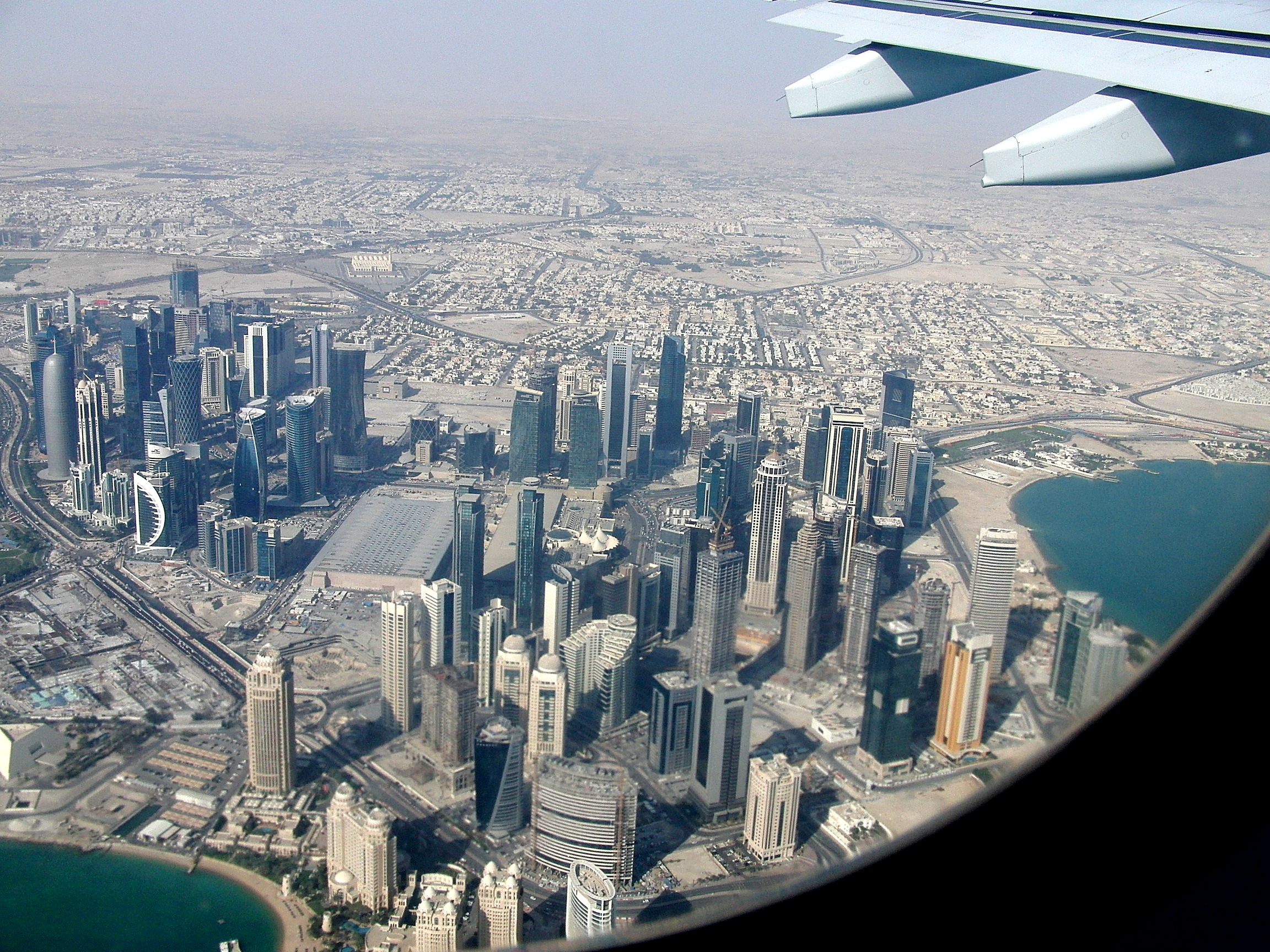 Blick auf die Hauptstadt von Katar. Doha